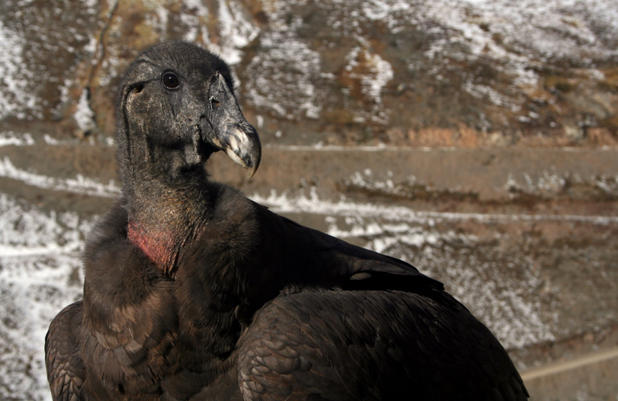 ...en este caso un cóndor hembra... igual de majestuosa... :D Vultur gryphus, si la biología no me falla. Era ese el nombre cientìfico, pero segùn lo que he leido ahorita es una alusión directa al Grifo, ser mitológico mitad águila y mitad león, que según las leyendas era el defensor de los yacimientos de minerales preciosos y minas de oro. Mañque en mapudungun, tiene varias derivaciones en apellidos mapuches, como por ejemplo Manquelaf, que significa condor que planea. En Saladillo.